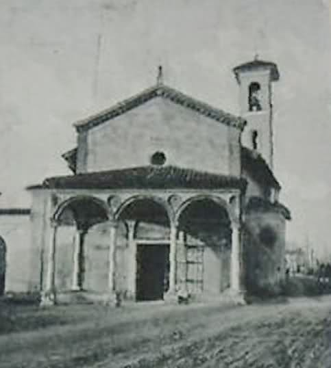 Milano, la chiesetta di San Rocco alla Lupetta